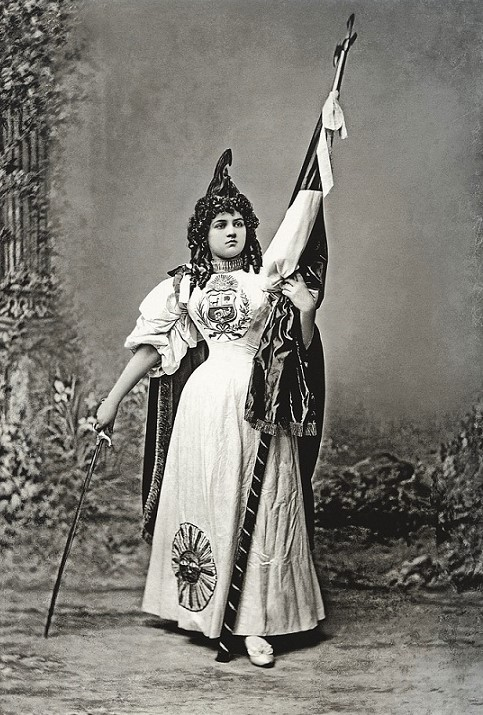 Patria Personificación femenina del Perú